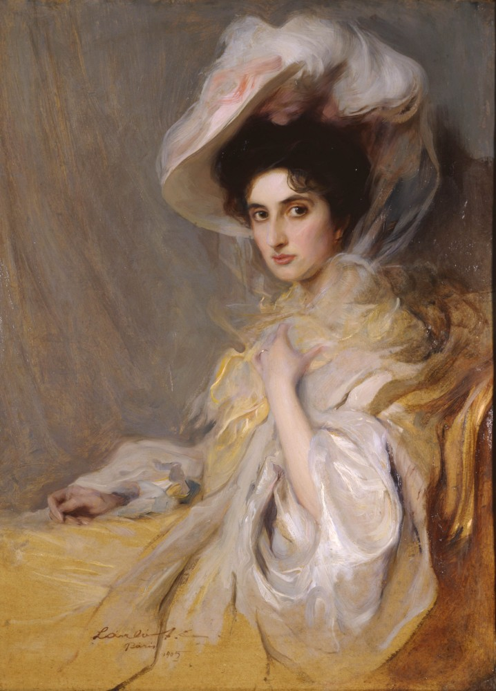 Elaine, Duchesse de Guiche